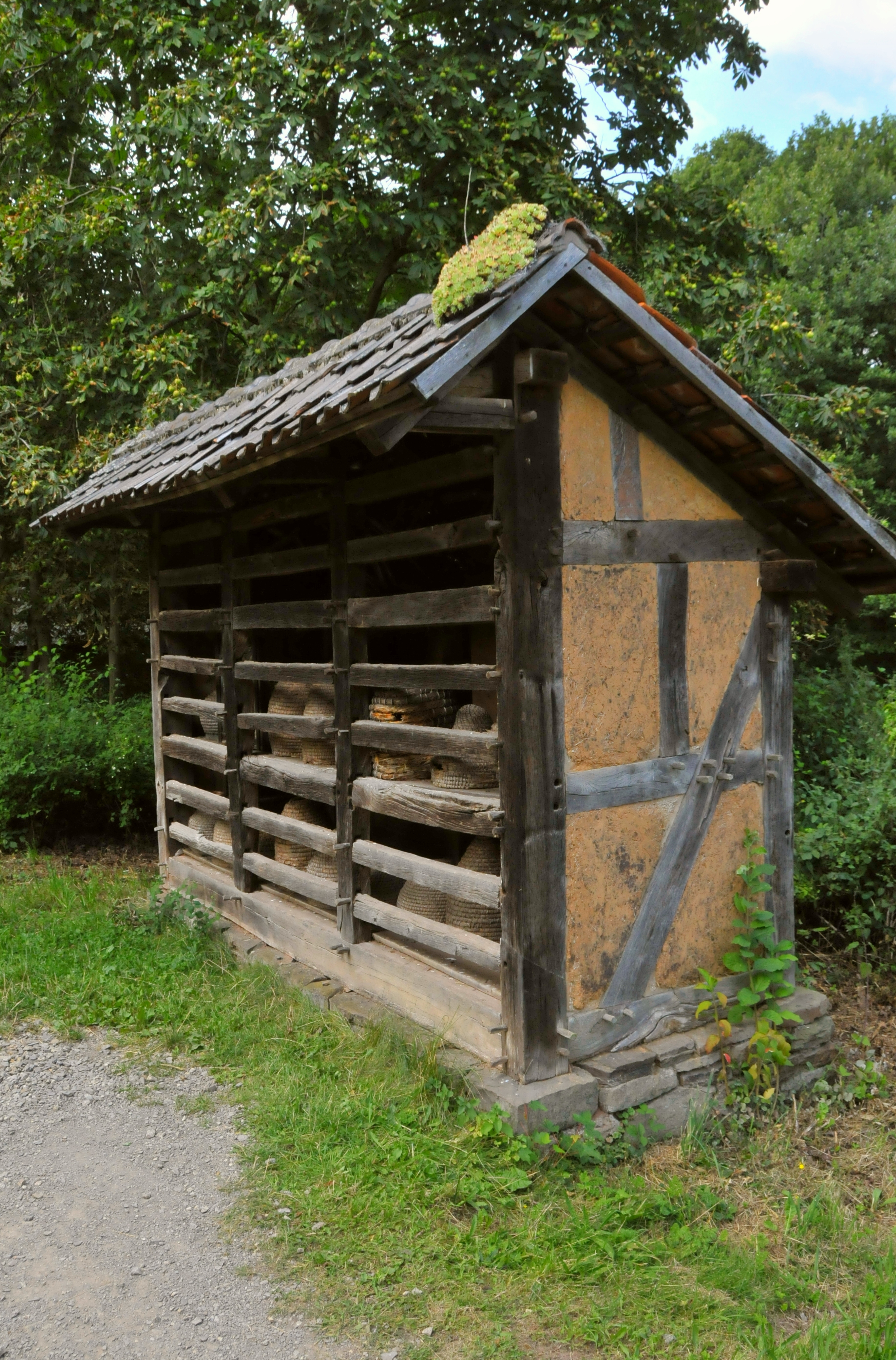 Freilichtmuseum Kommern: Bienenhaus